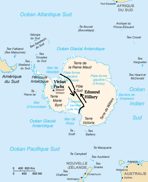 Parcours de Fuchs et Hillary lors de l'expédition TransAntarctique de 1955-58